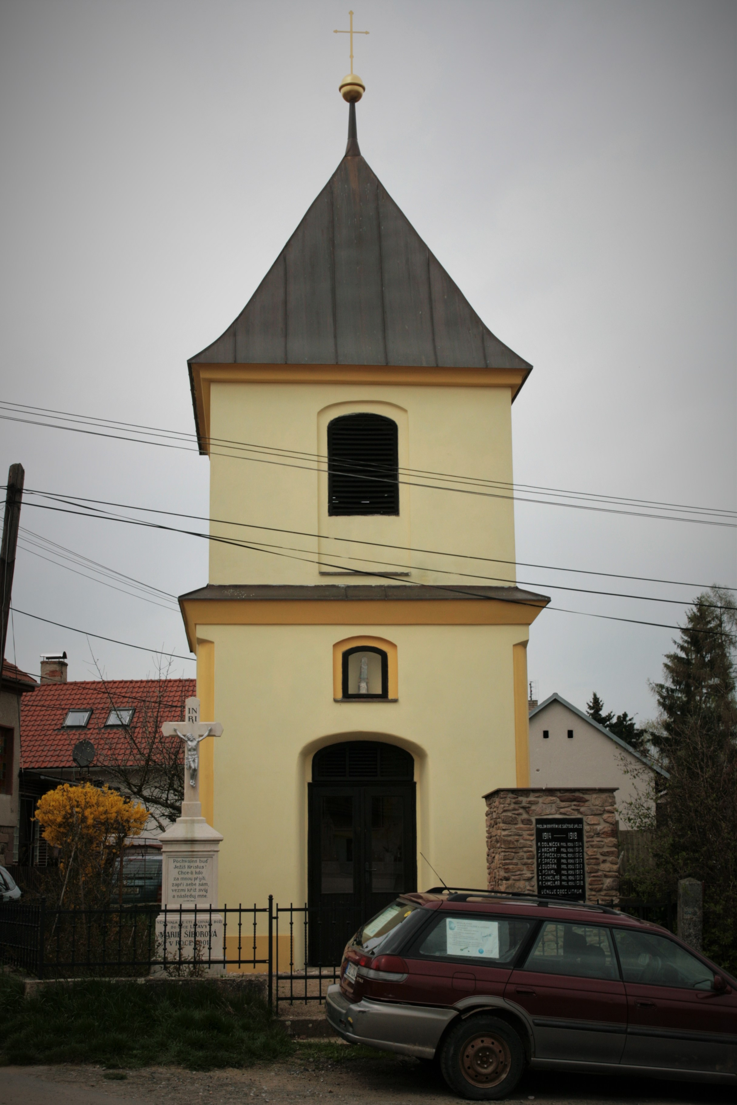 Vesnice Litava, část obce Olší v okrese Brno-venkov. Kaple sv. Anny na návsi, s křížem a památníkem obětí 1. světové války.